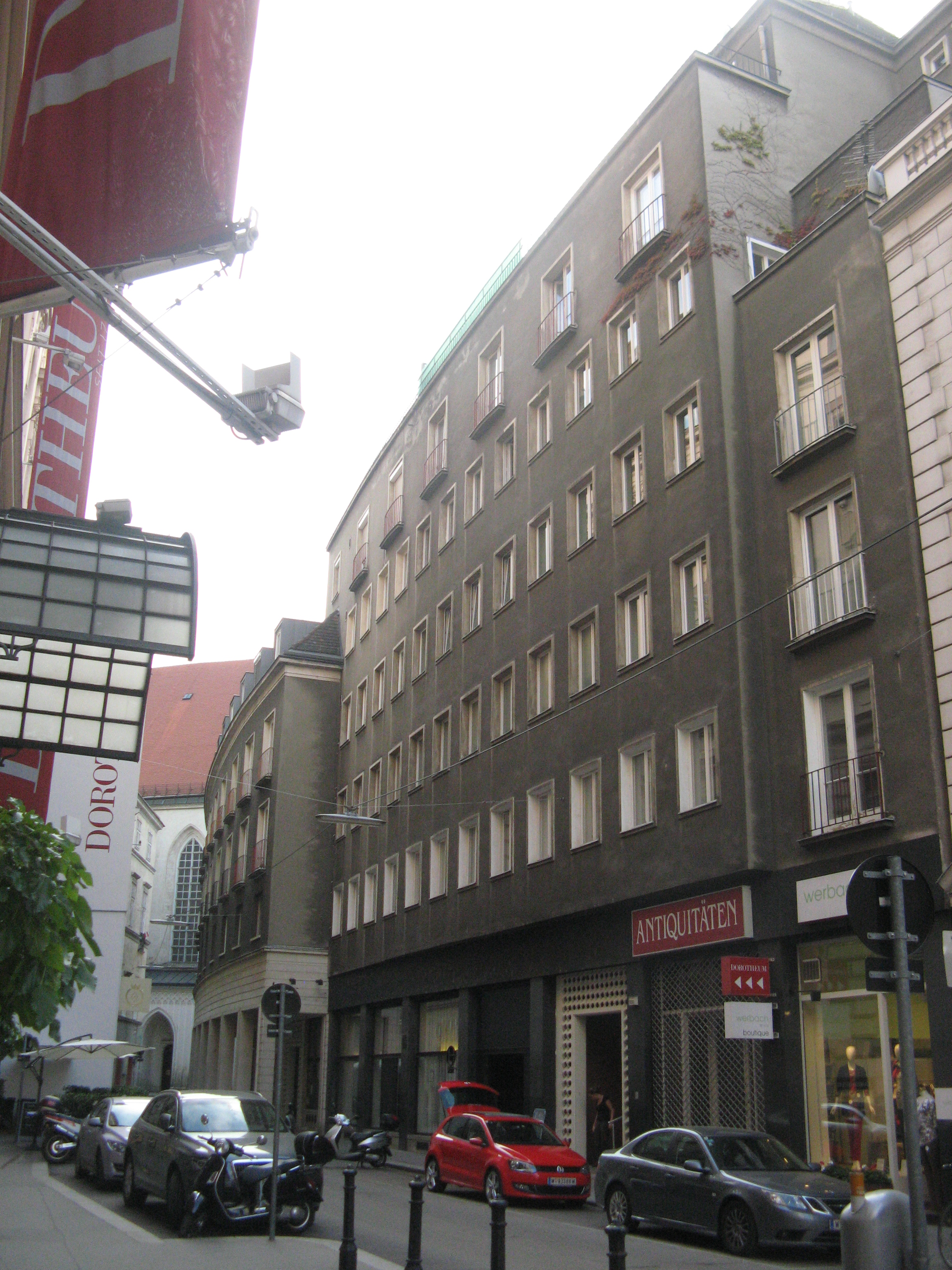 Dorotheergasse 20-24 (1956-58) von Robert Kramreiter, Wien-Innere Stadt